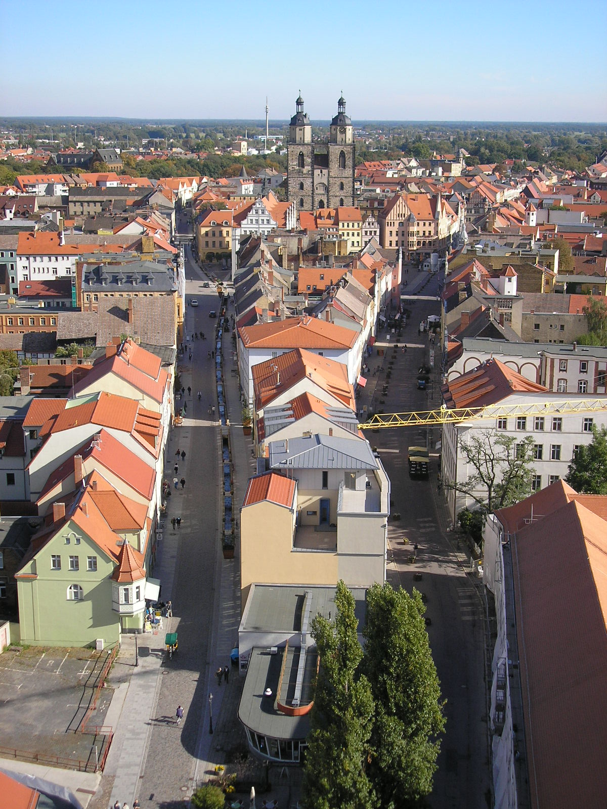 Die Altstadt von Wittenberg vom Turm der Schlosskirche aus gesehen.